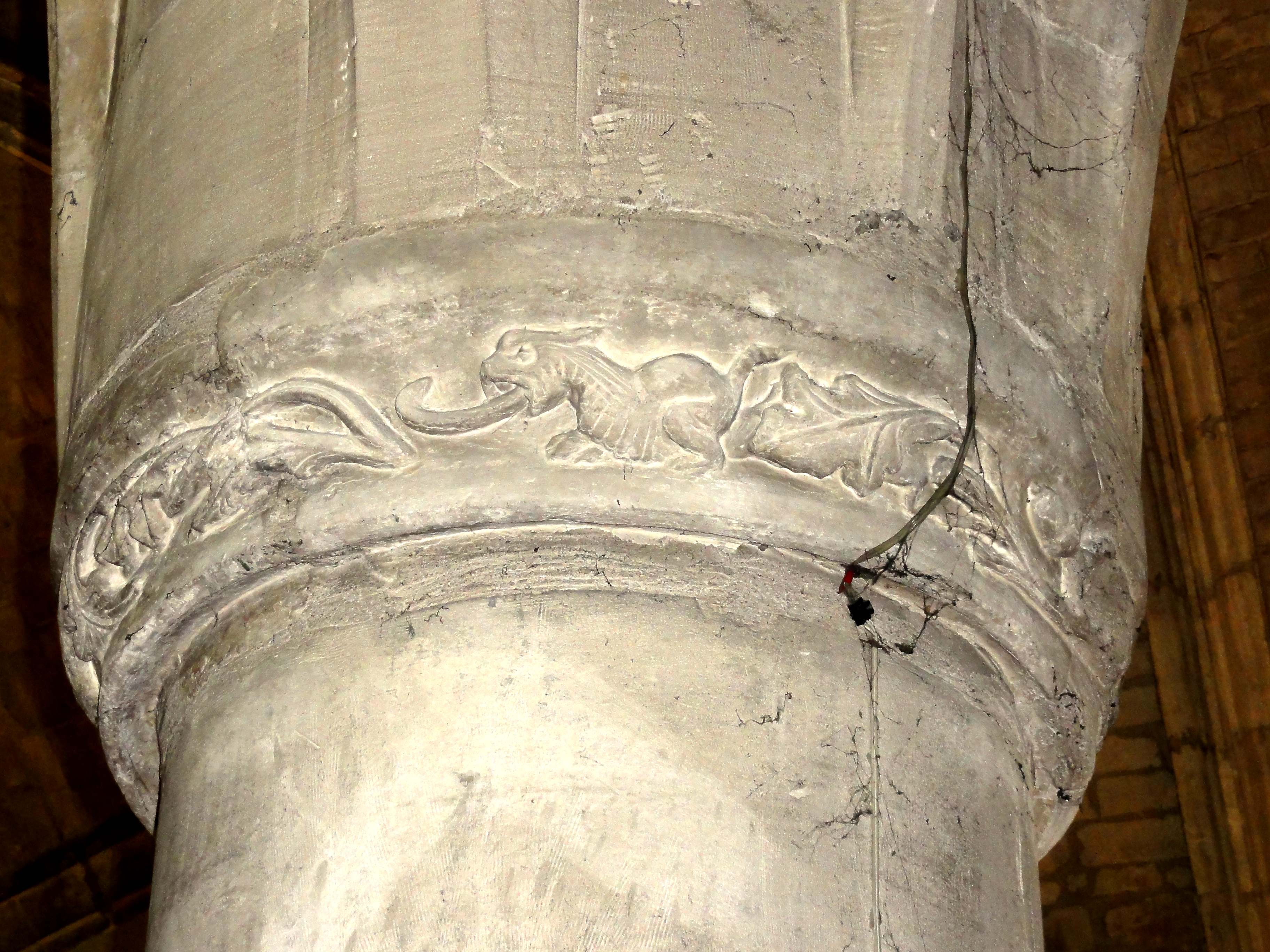 Chapiteau du pilier SE du clocher (3e pilier central de l'église).